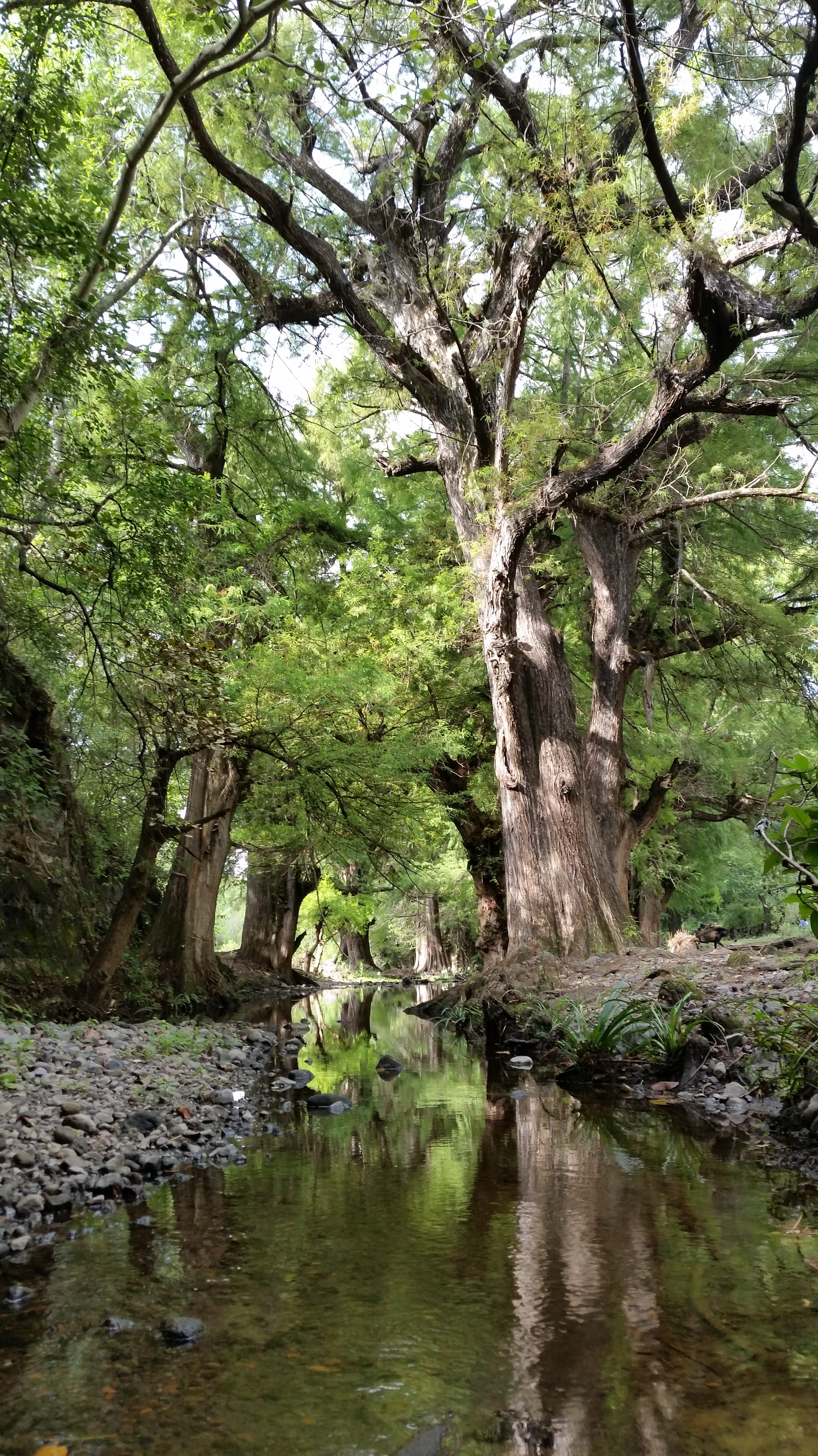 Reserva de Ahuehuetes en Amilcingo, Temoac, Morelos.